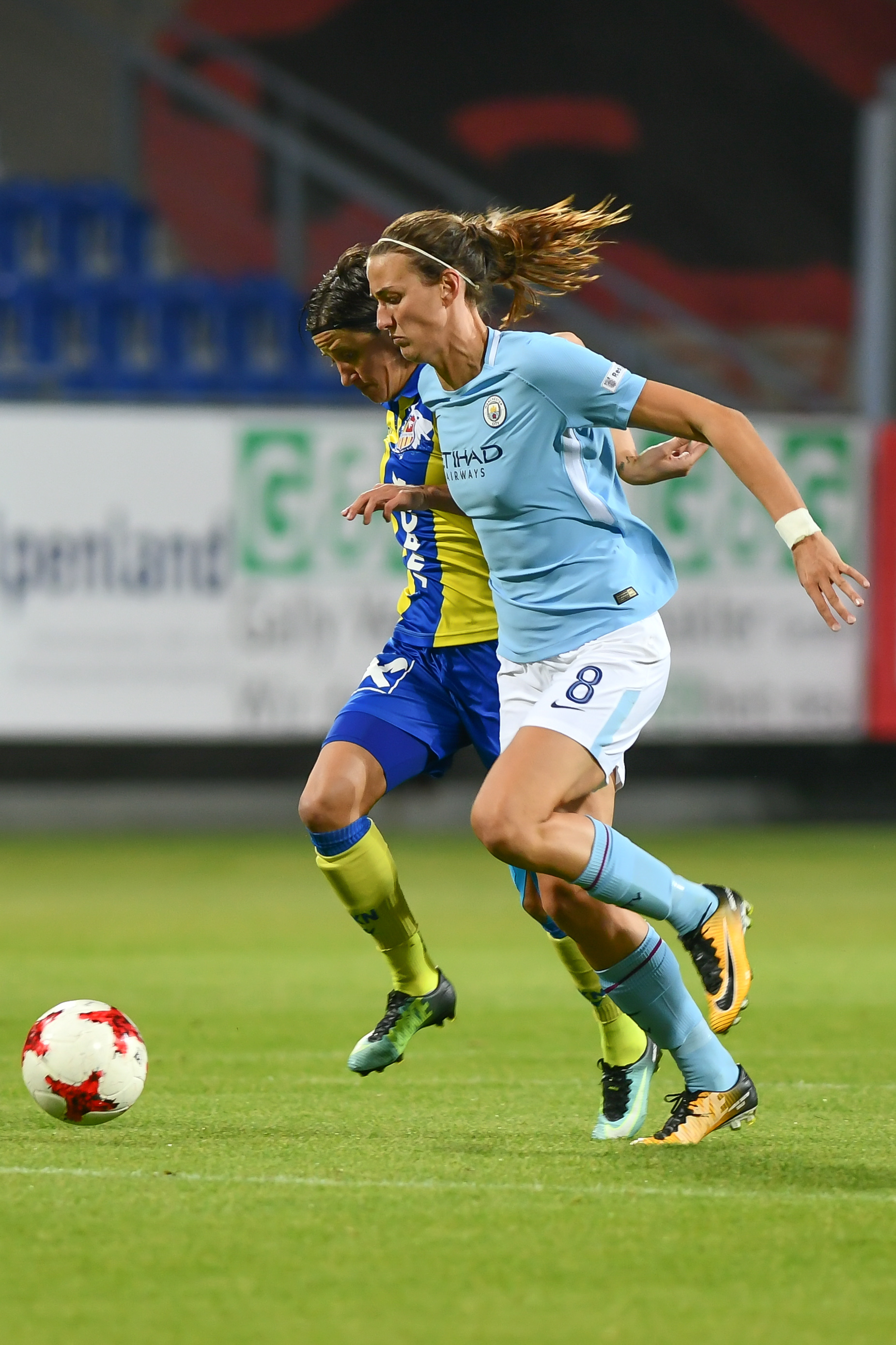 UEFA Women's Champions League 2017/18, Runde der letzten 32, SKN St. Pölten gegen Manchester City W.F.C. am 4.10.2017, Bild zeigt: Jill Louise Scott (8, MCW), Mateja Zver (24, SKN)